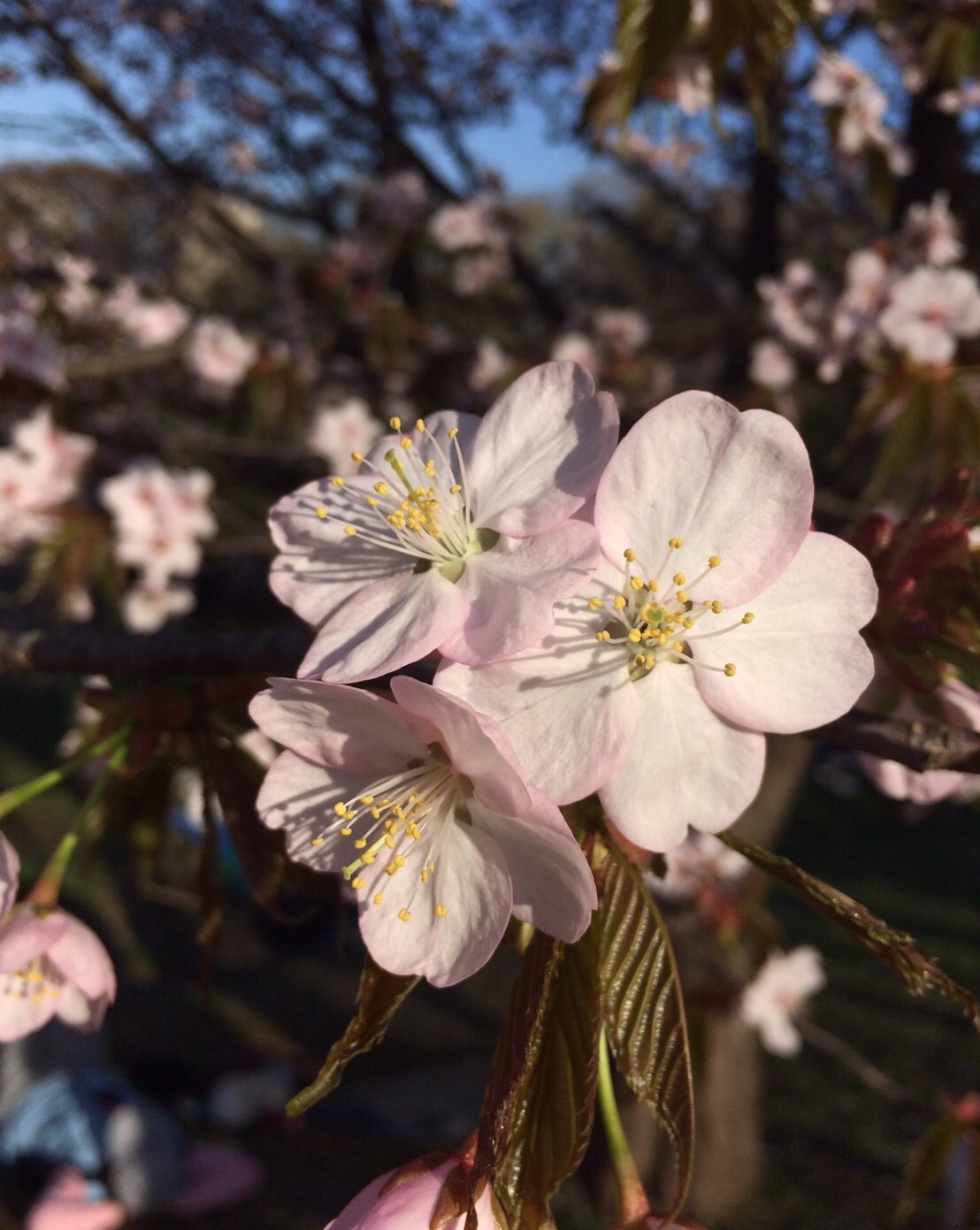 桜 札幌円山公園